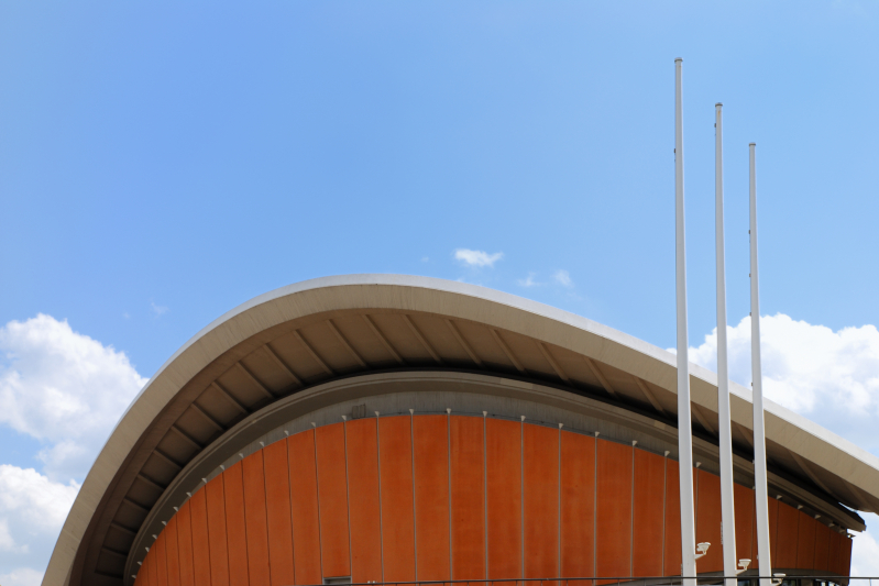 Kongresshalle Berlin, Haus der Kulturen der Welt, Schwangere Auster